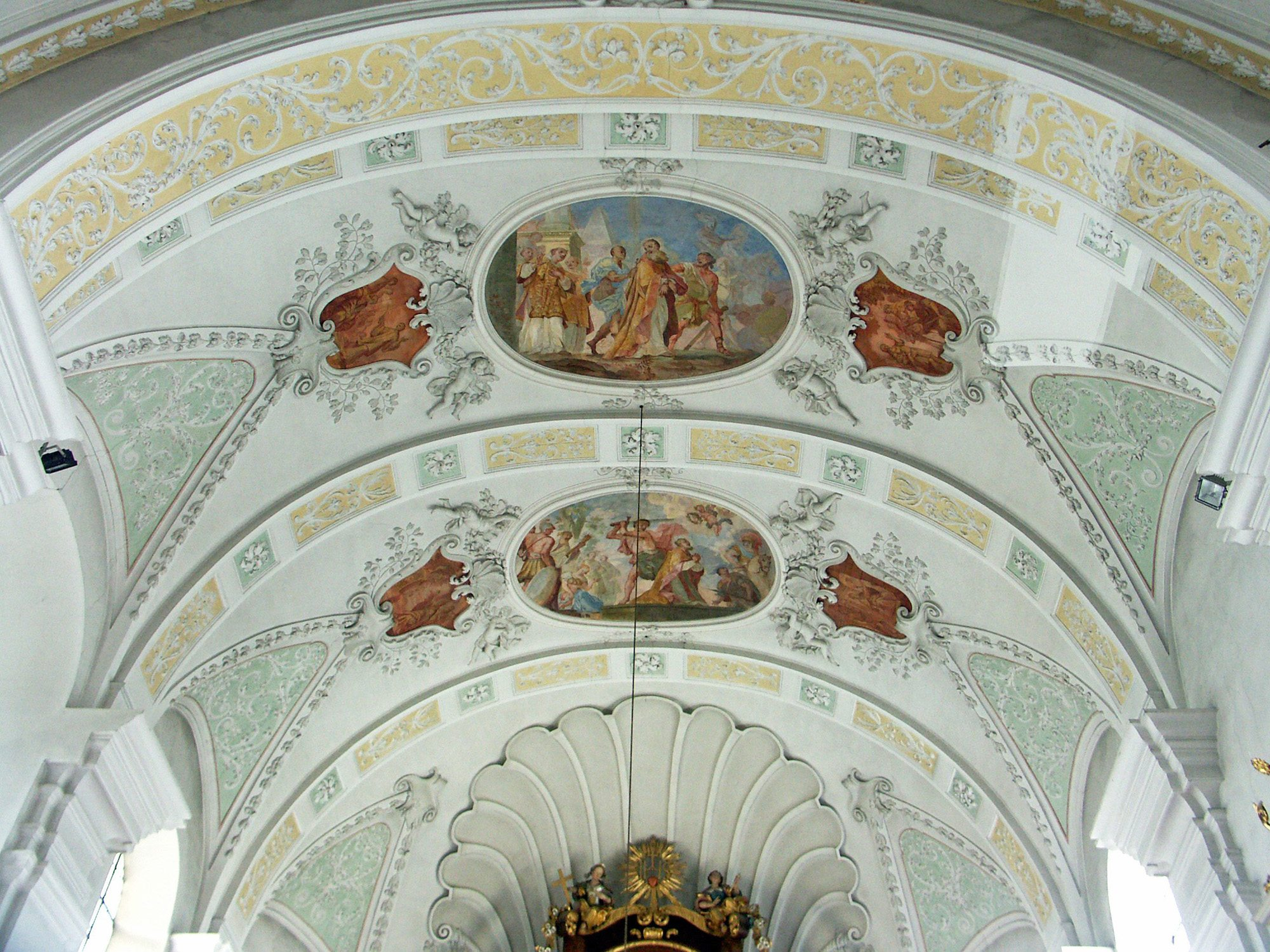 Schliersee, St. Sixtus, Chordecke von Johann Baptist Zimmermann